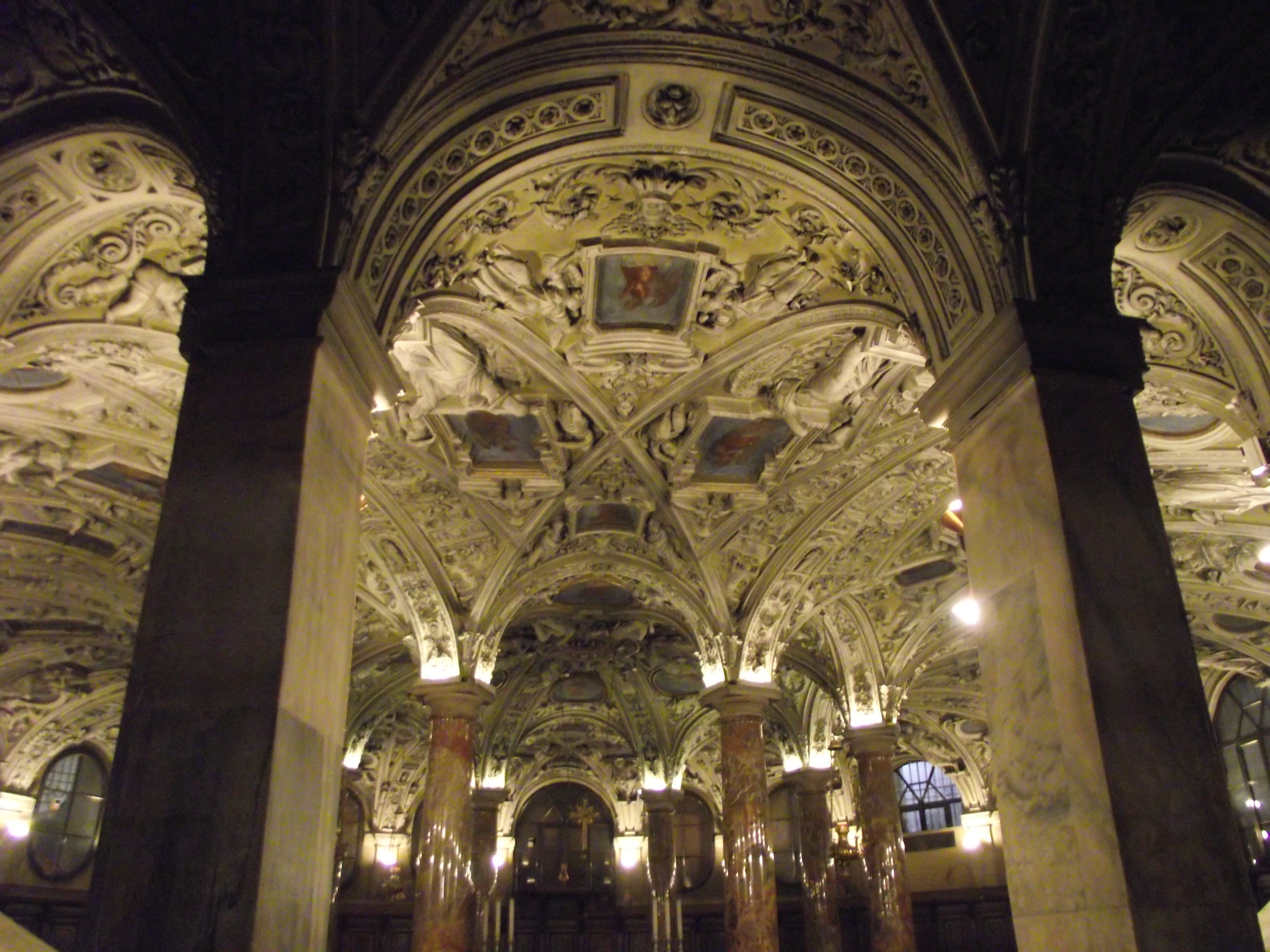 Cripta